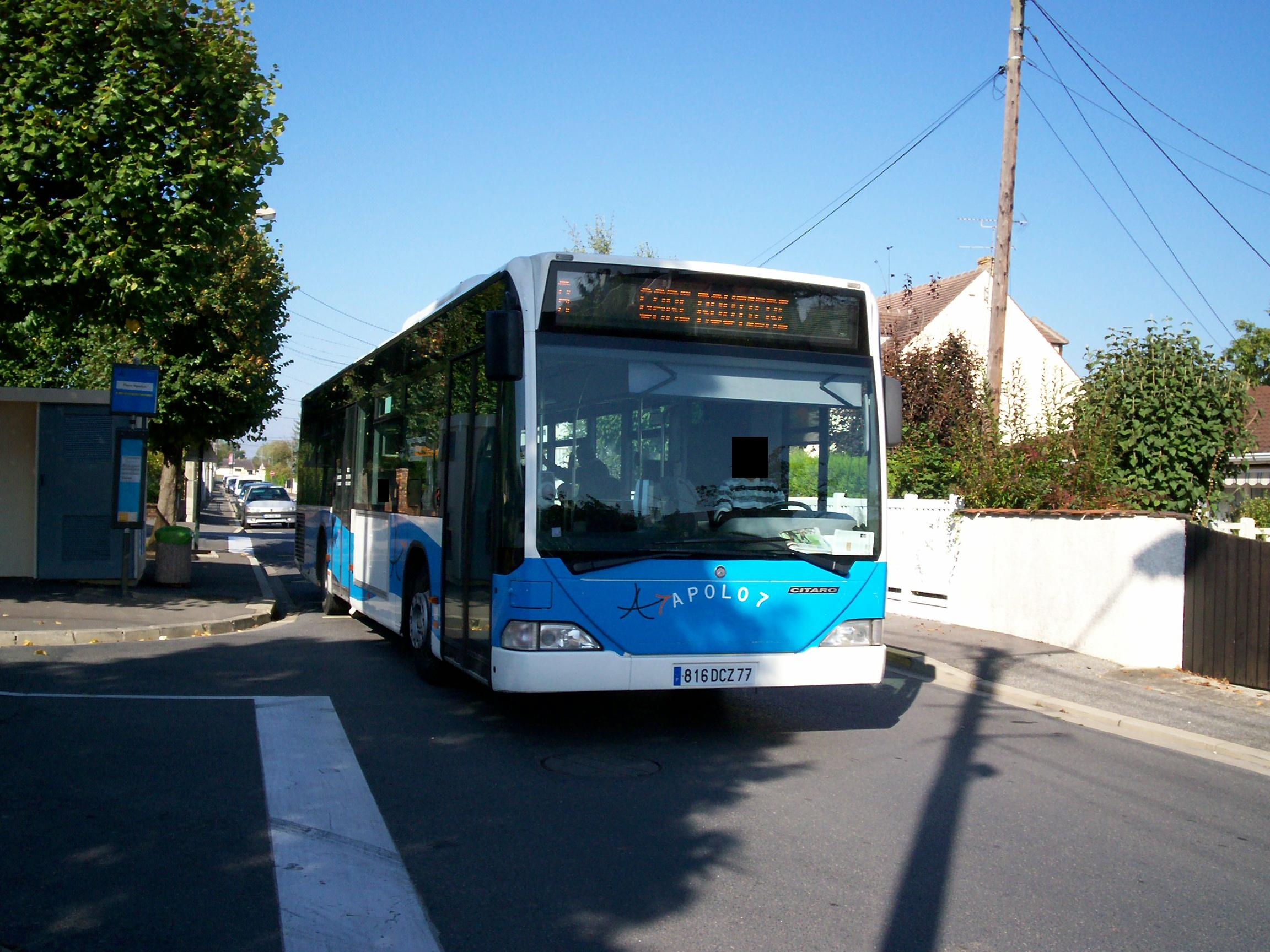 Citaro à la place henrion